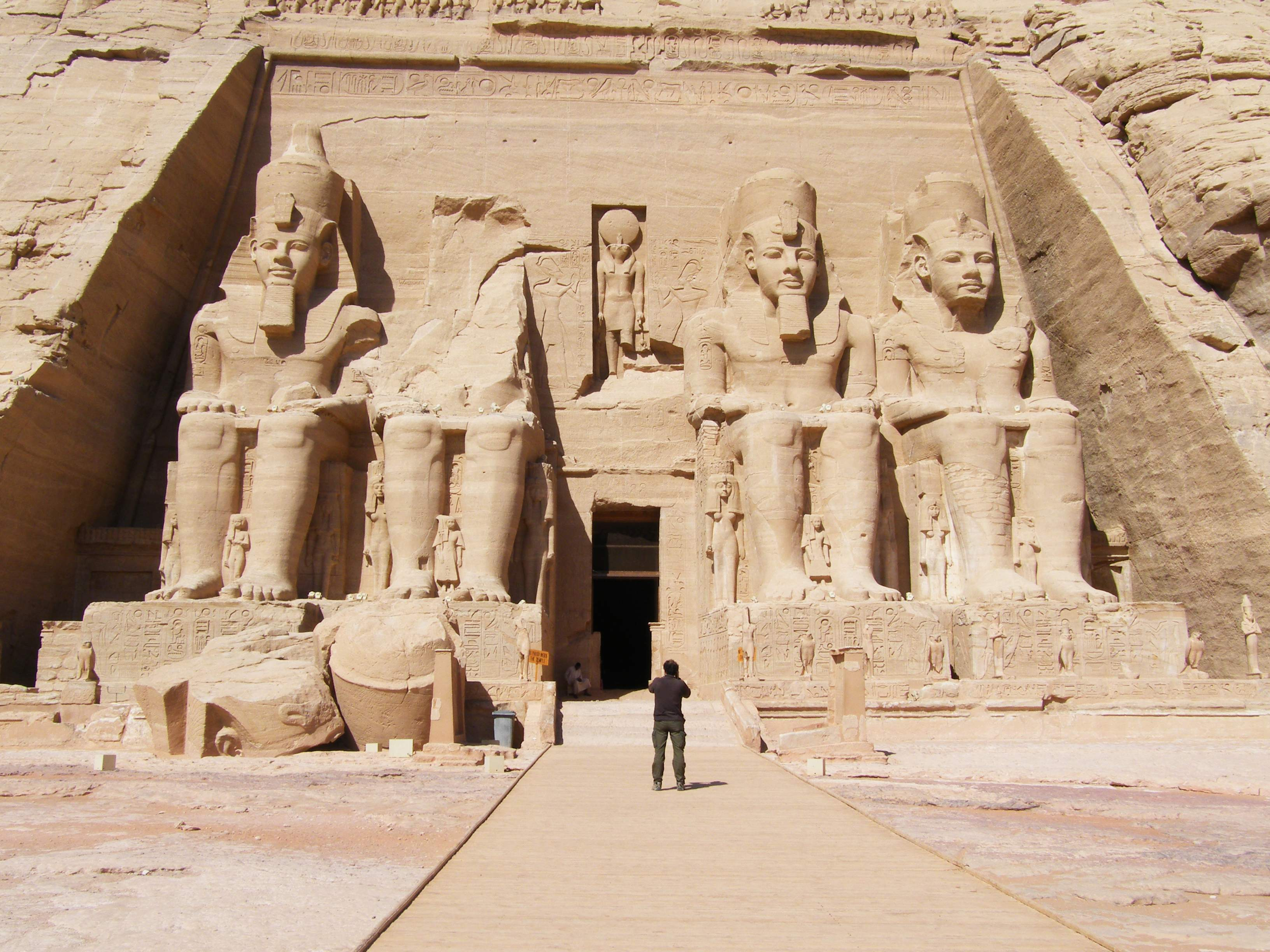 temple d'Abu Simbel